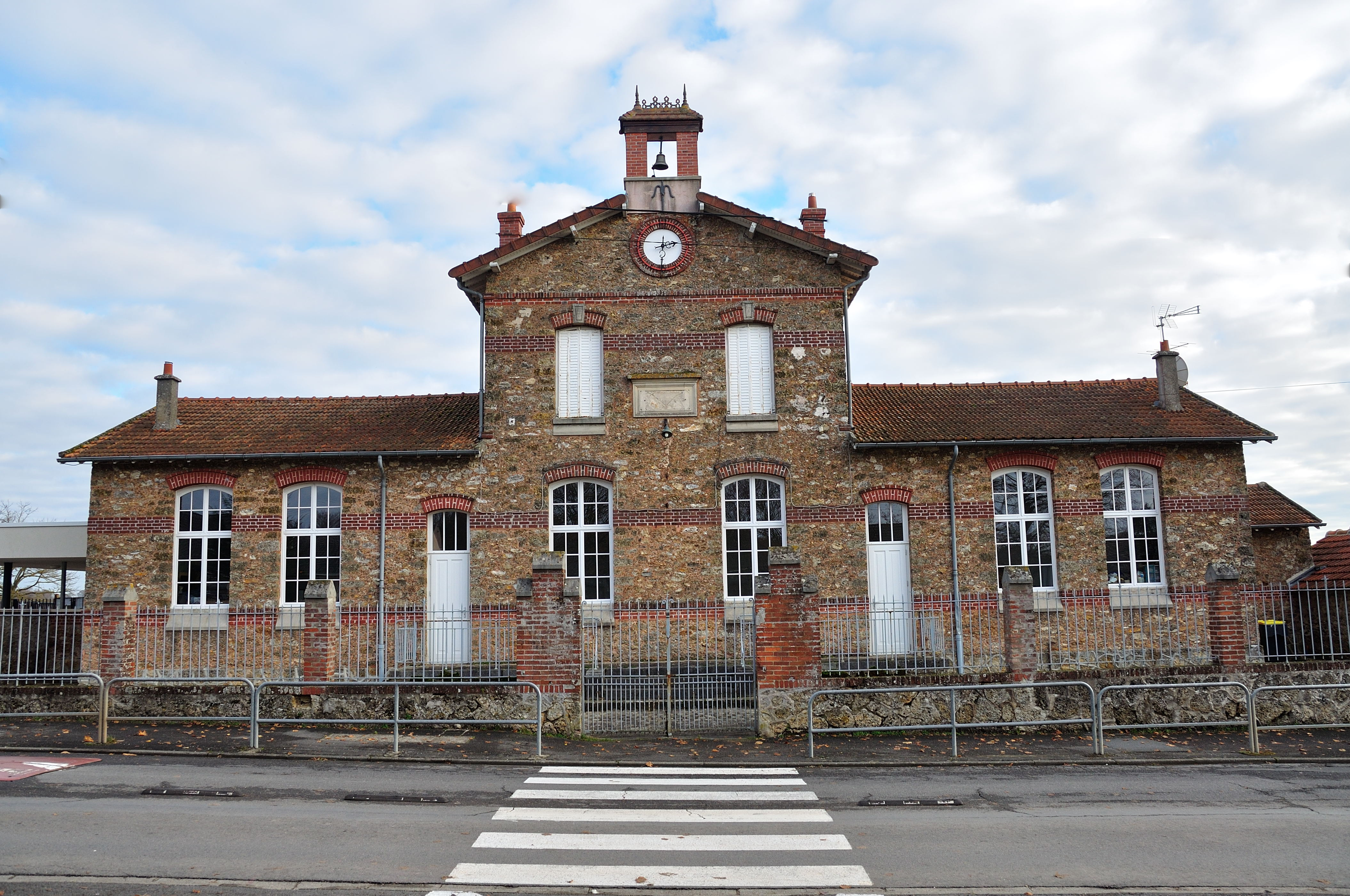 École et Ancienne mairie-école de Chauffry. (département de la Seine-et-Marne, région Île-de-France).